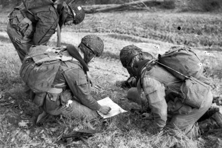 Kartenstudium während des Marsches beim Luftsturmregiment 40